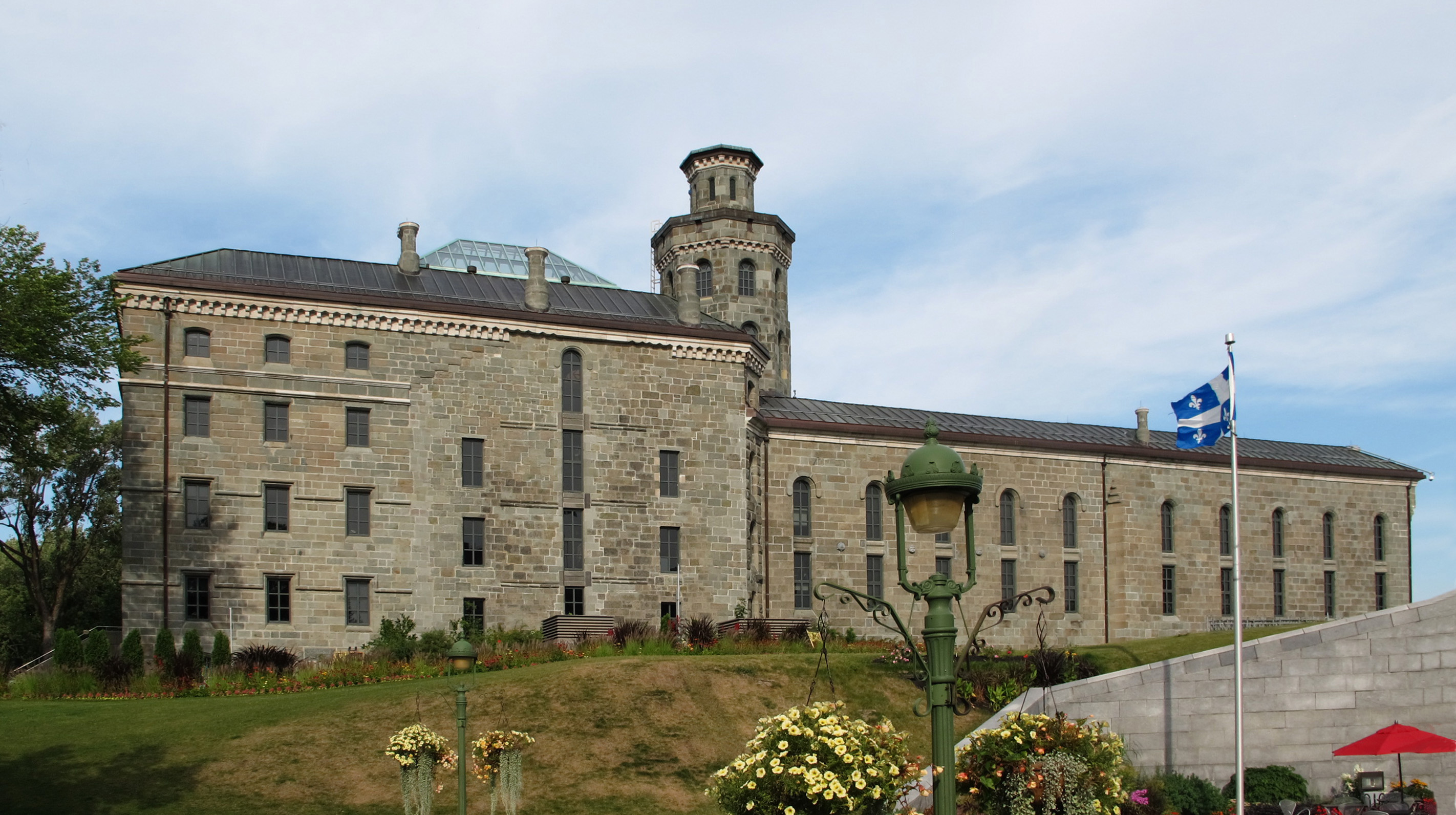 Musée national des beaux-arts du Québec, Pavillon Charles-Baillairgé, Québec.